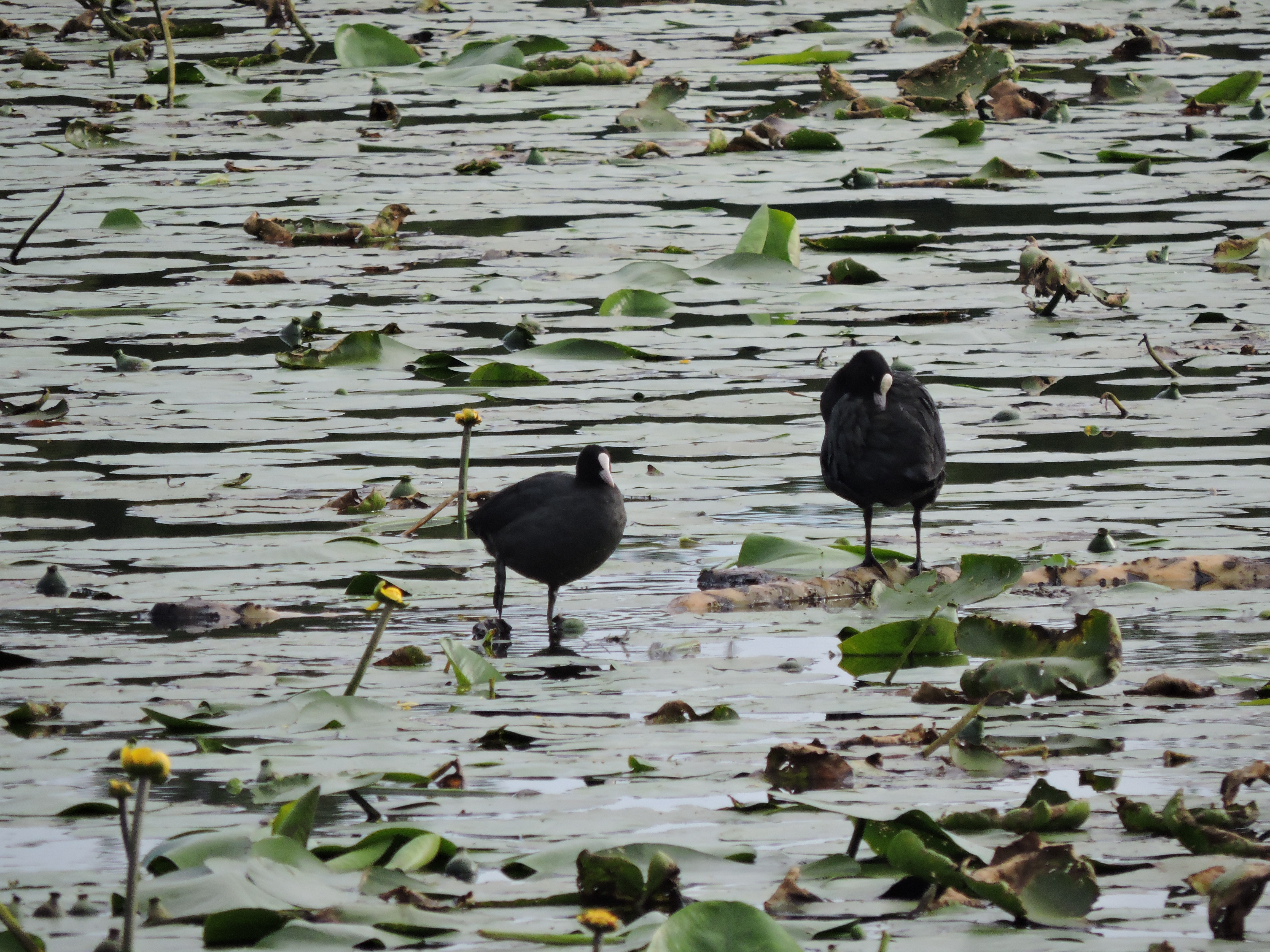 Monte Musiné e Laghi di Caselette (Q49964176)